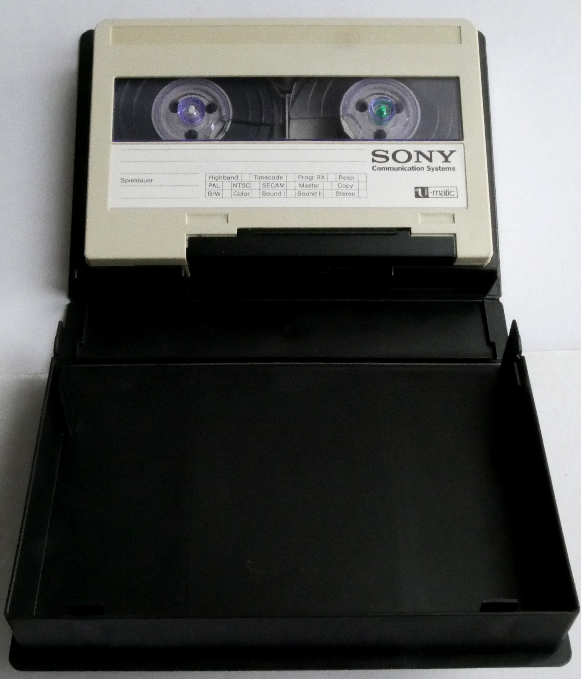 U-matic S-Kassette mit Schutzhülle (Miniformat) für portabe Geräte